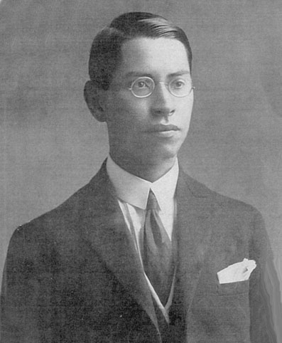 Ludgero Prestes, numa foto que ele enviou ao seu protetor, o escritor Euclides da Cunha, ao se formar professor pela Escola Normal Caetano de Campos, em 1908